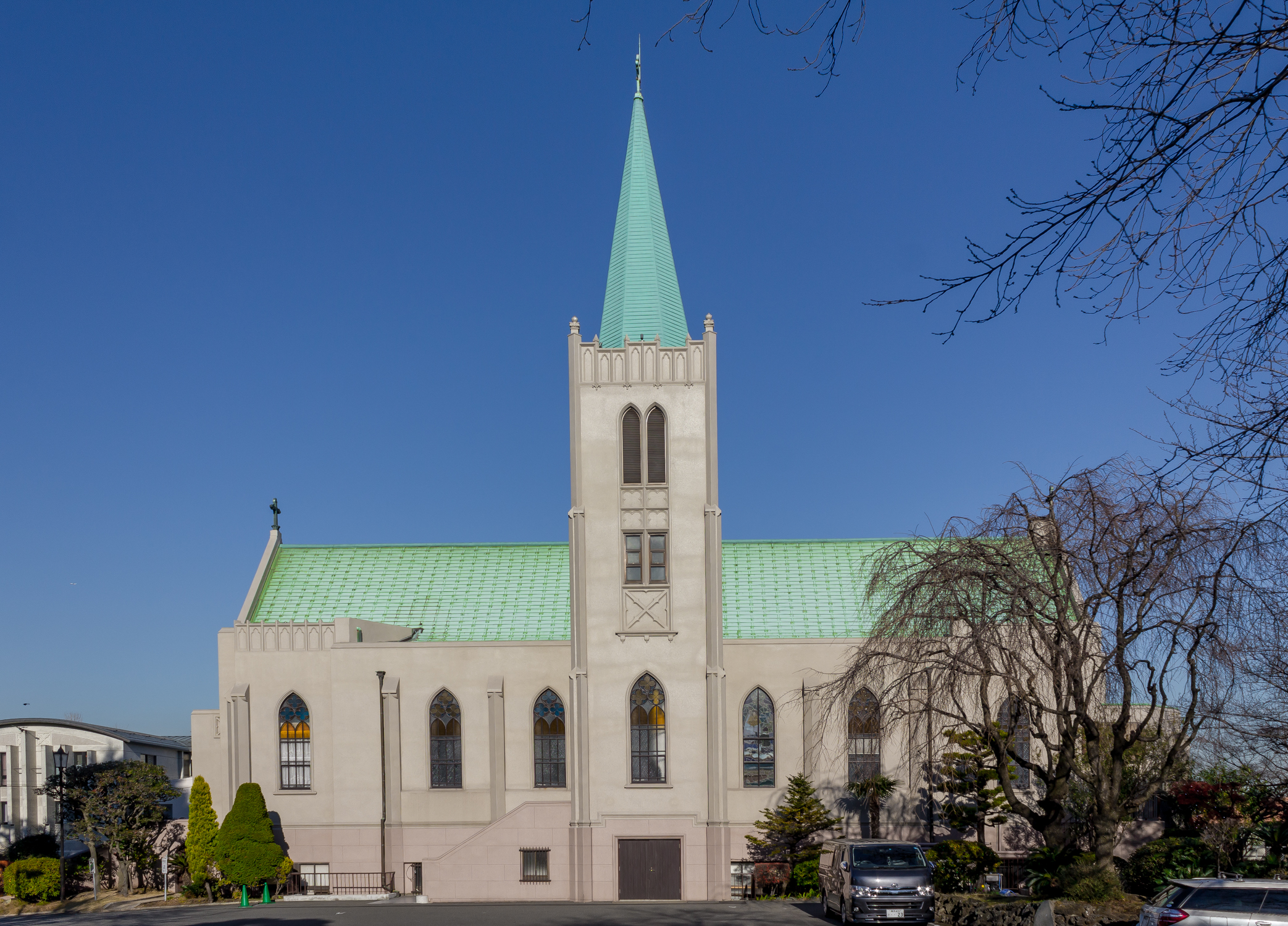 カトリック山手教会（ヤン・ヨセフ・スワガー設計、1933建築）。横浜市中区山手町。